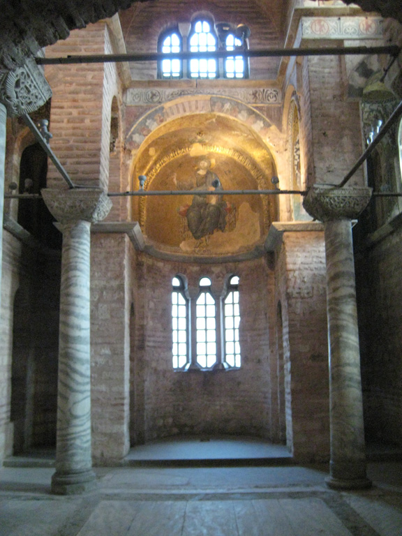 Pammakaristos Church